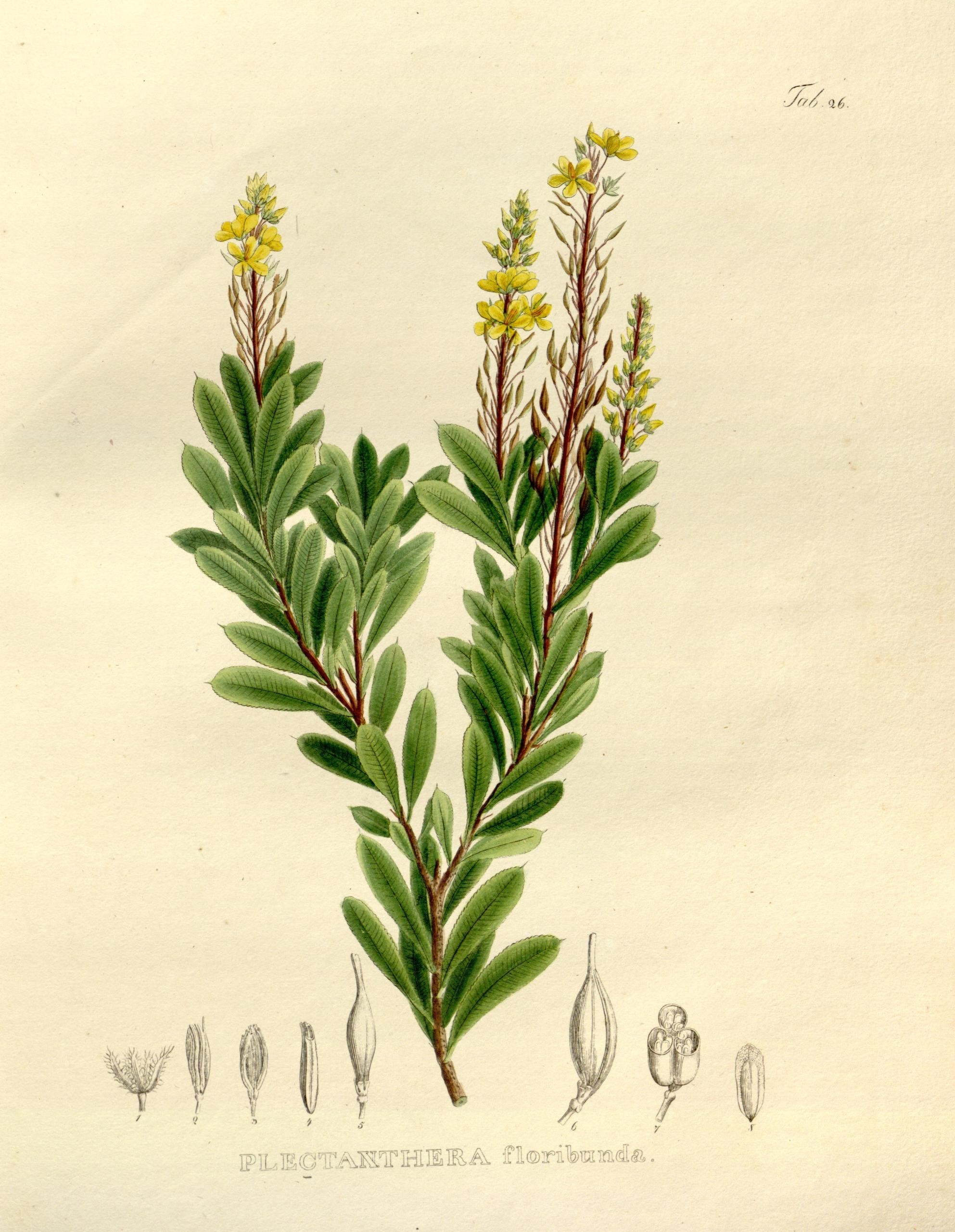 Luxemburgia octandra (= Plectanthera floribunda) Nova genera et species plantarum. Monachii [Munich] :Impensis Auctoris,1824-1829 [i.e. 1824-32]..